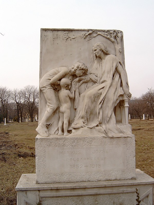 Márkus József sírja Budapesten. Kerepesi temető: 9-1-36 (Stróbl Alajos műve).